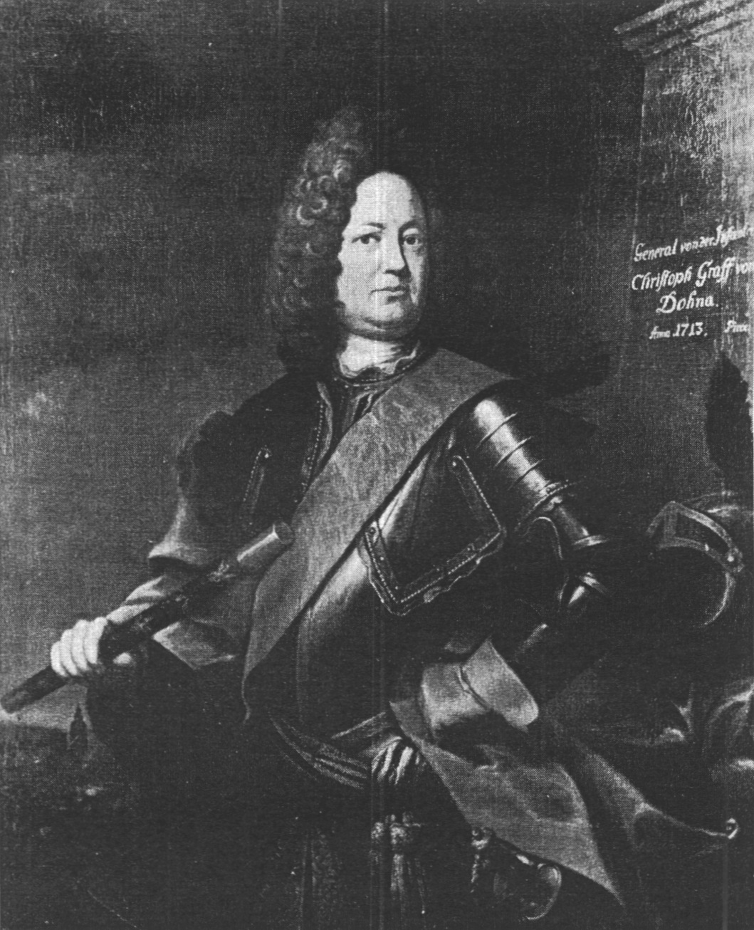 Dohna-Schlodien, Christoph Burggraf und Graf zu (1665–1733), General und Diplomat